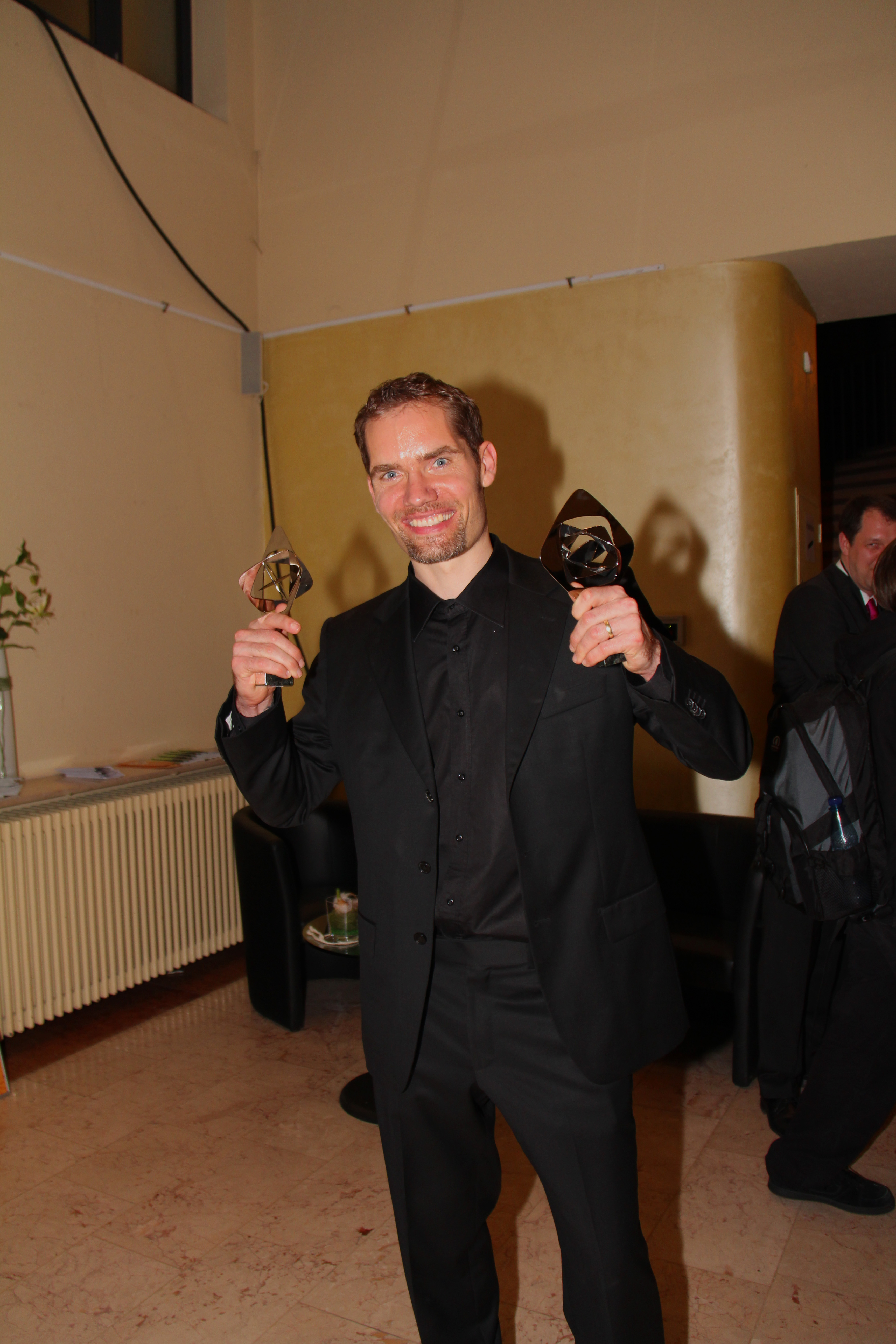 Grimme-Preisträger Christian Zübert bei der Verleihung 2011